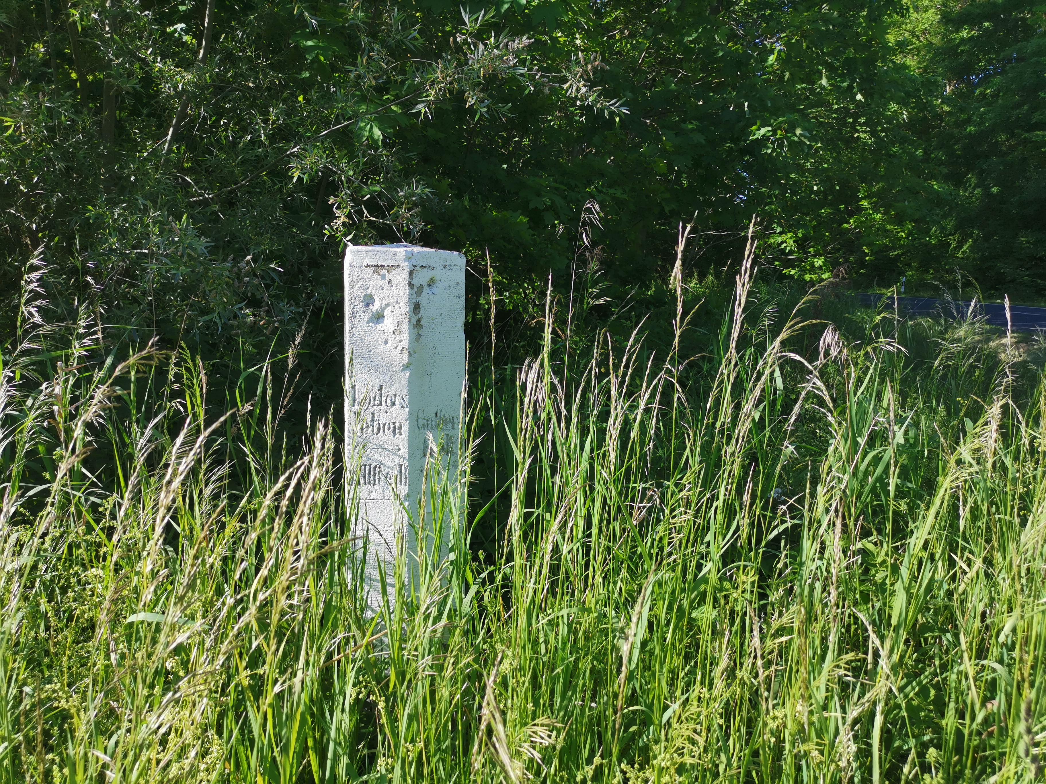 Wegweiser in Winkel an der K219